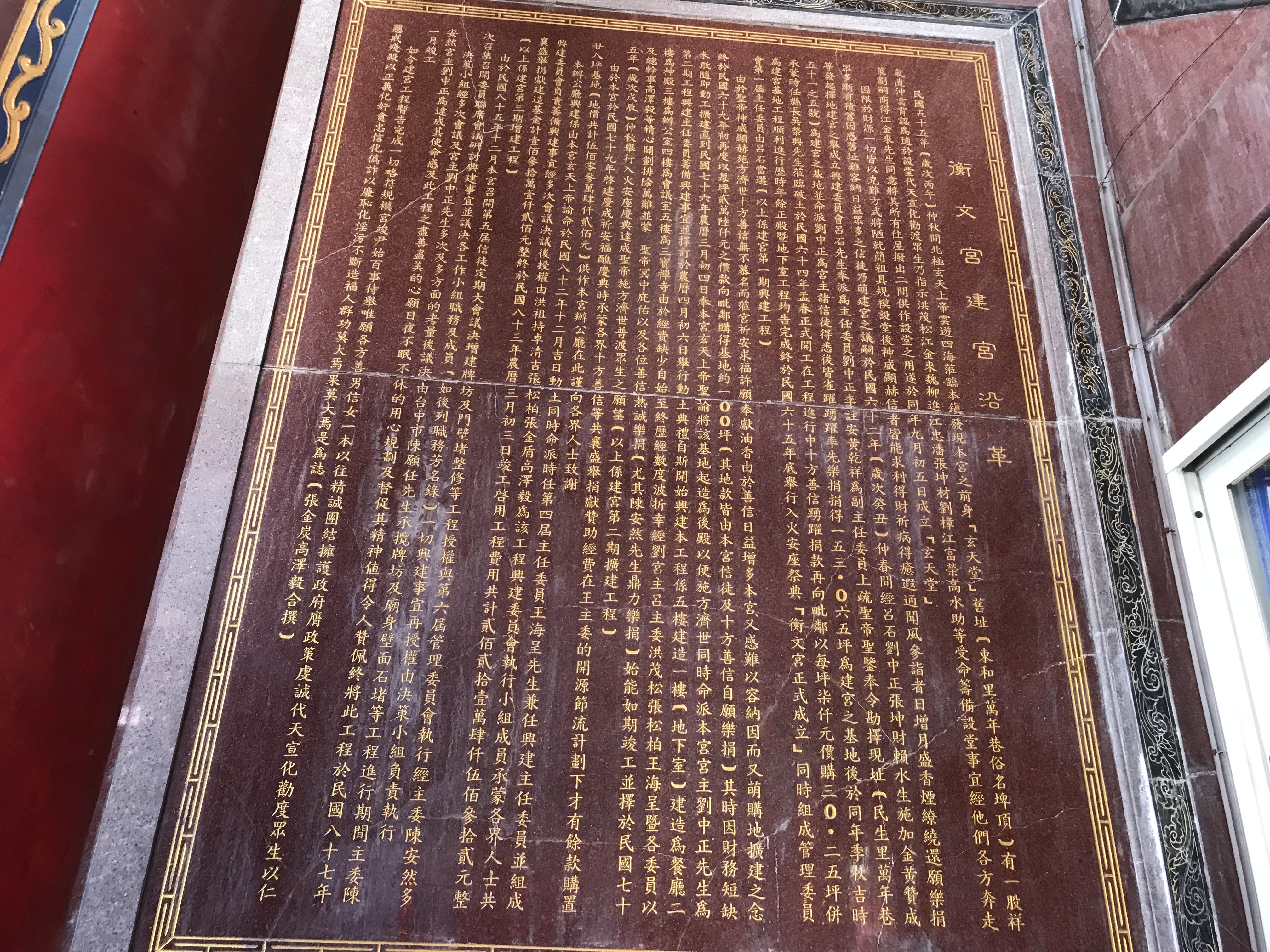 中文（台灣）: 員林衡文宮沿革